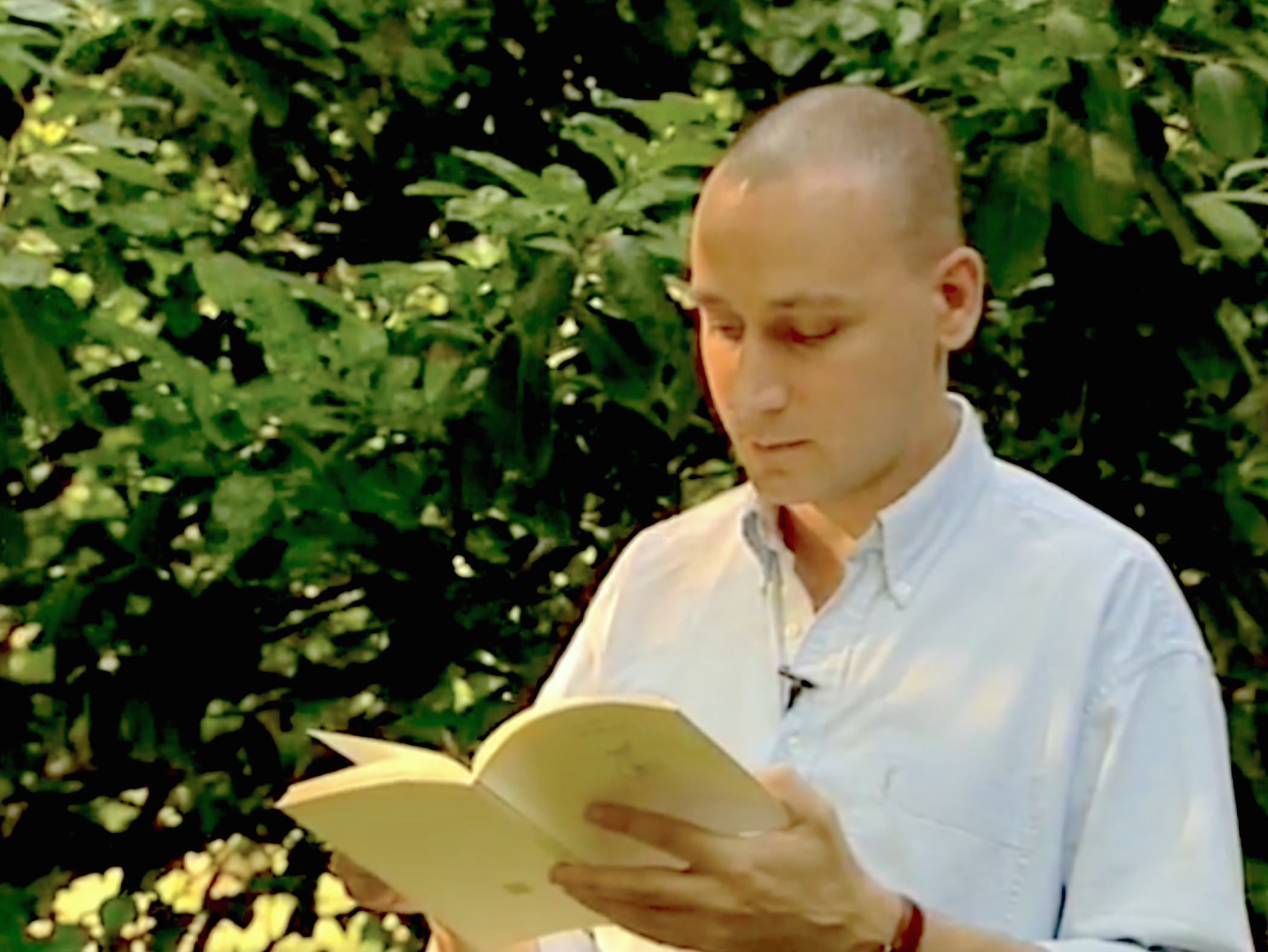 El poeta Mario Miguez en 2006